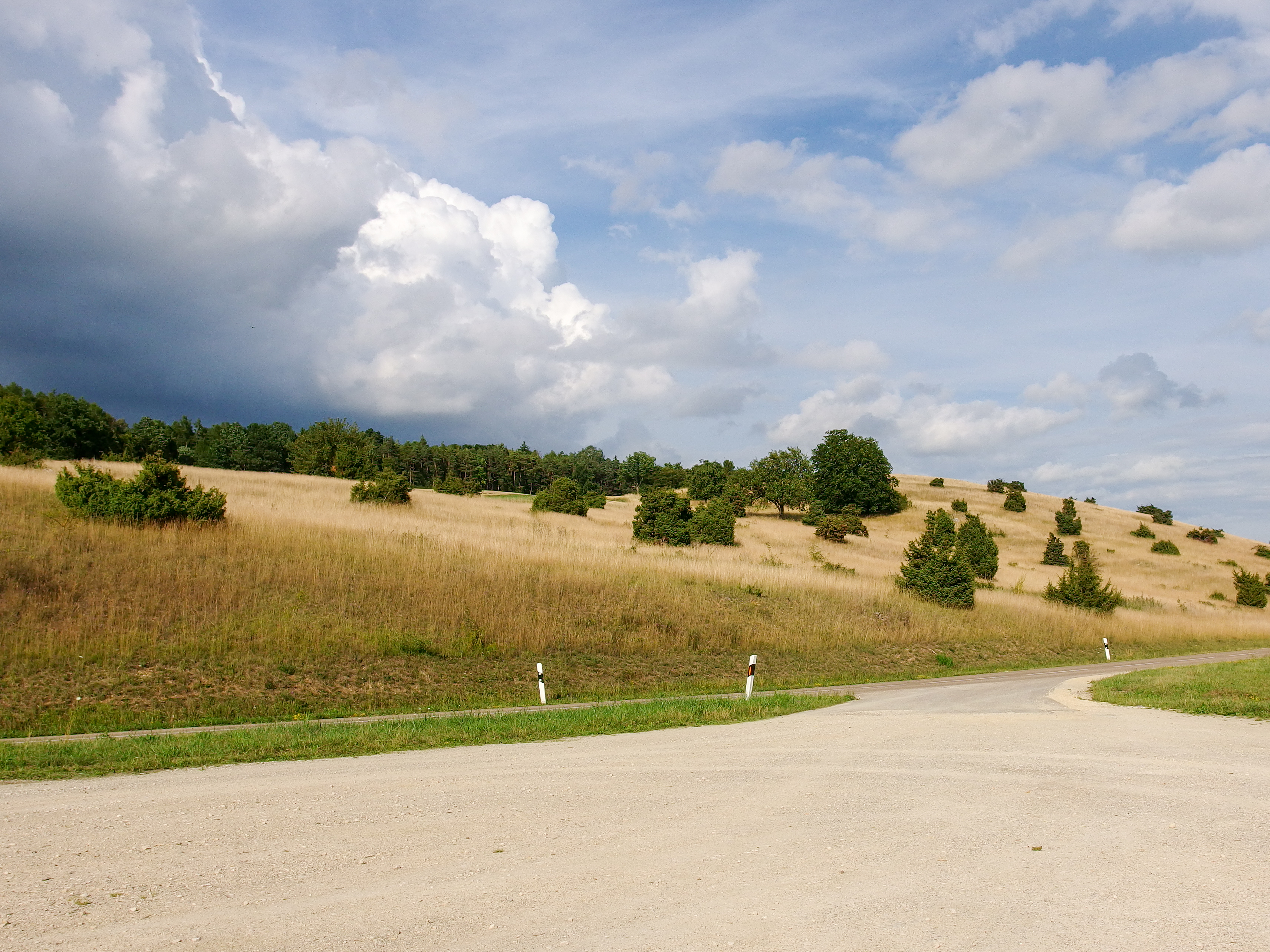 Blick von NW zu einem Teilgebiet des Landschaftsschutzgebietes LSG-00188.01